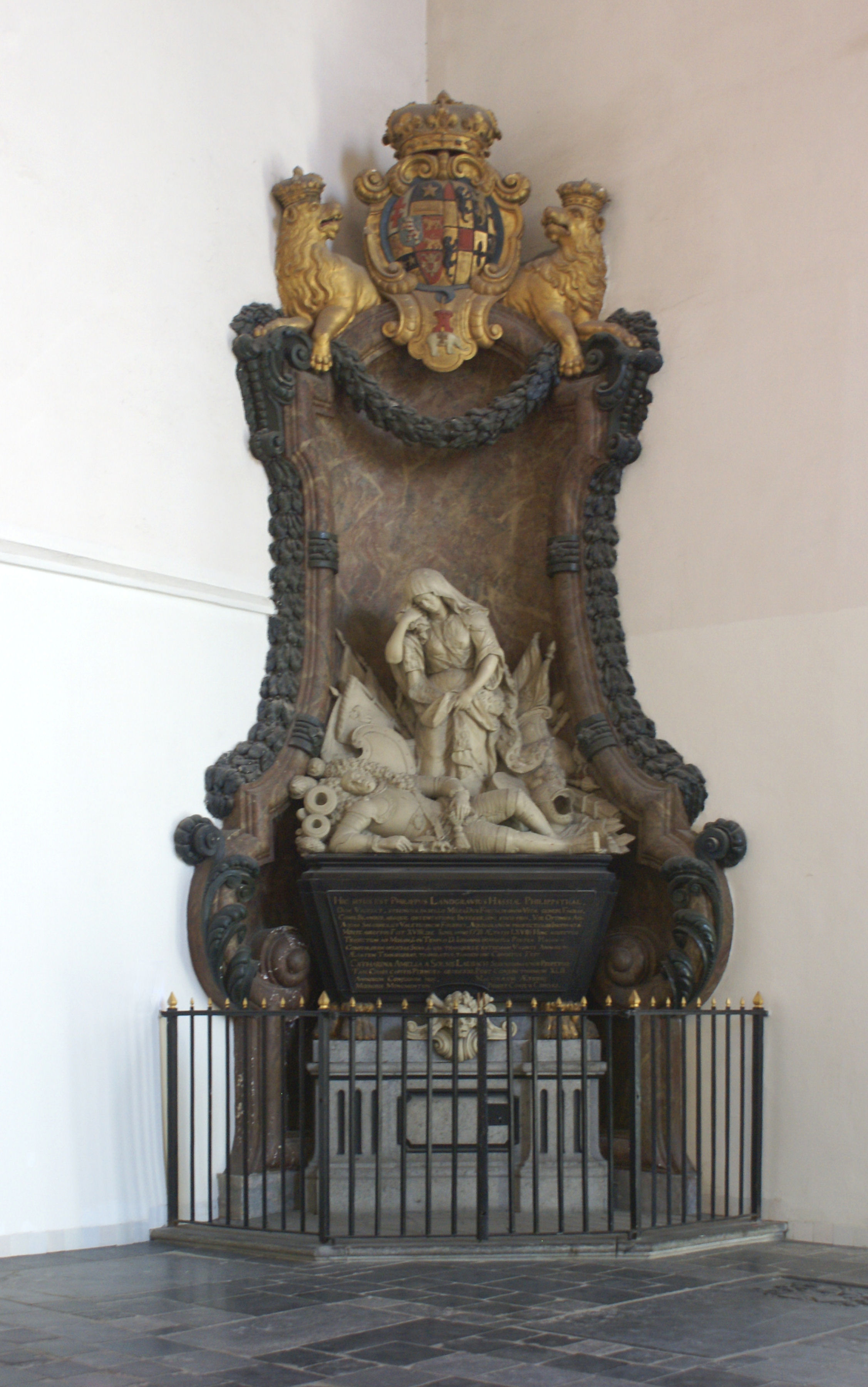 Grafmonument van Philips landgraaf van Hessen Philippsthal, door Daniel Marot